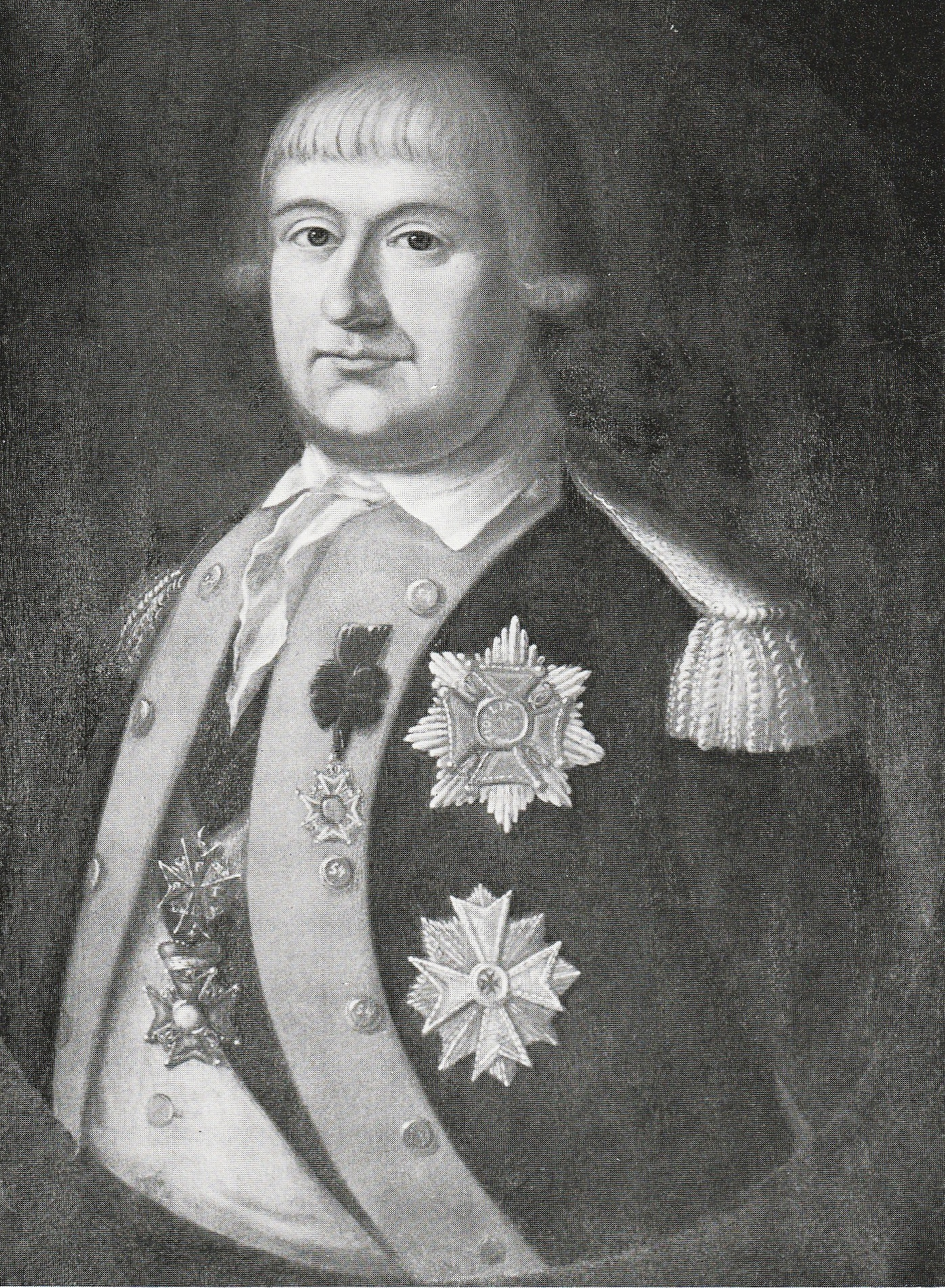 Graf Carl II. Gustav Reinhard Woldemar von Leiningen (1747–1798) Letzter in Grünstadt regierender Graf der Neuleininger Linie.